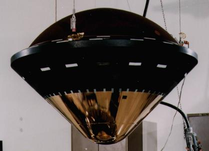 Sonda esapcial Galileo durant l'ensamblatge final